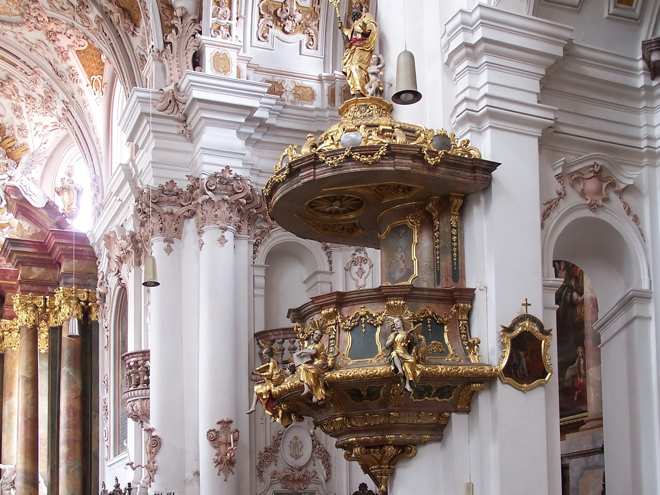 Rohr in Niederbayern. Abt-Dominik-Prokop-Platz 3. Katholische Pfarr- und Klosterkirche Mariä Himmelfahrt. Ehem. Augustinerchorherren-Stiftskirche, barocke Anlage mit Seitenkapellen und Querarmen, 1717–22 von Egid Quirin Asam erbaut. Barocke Kanzel um 1730.